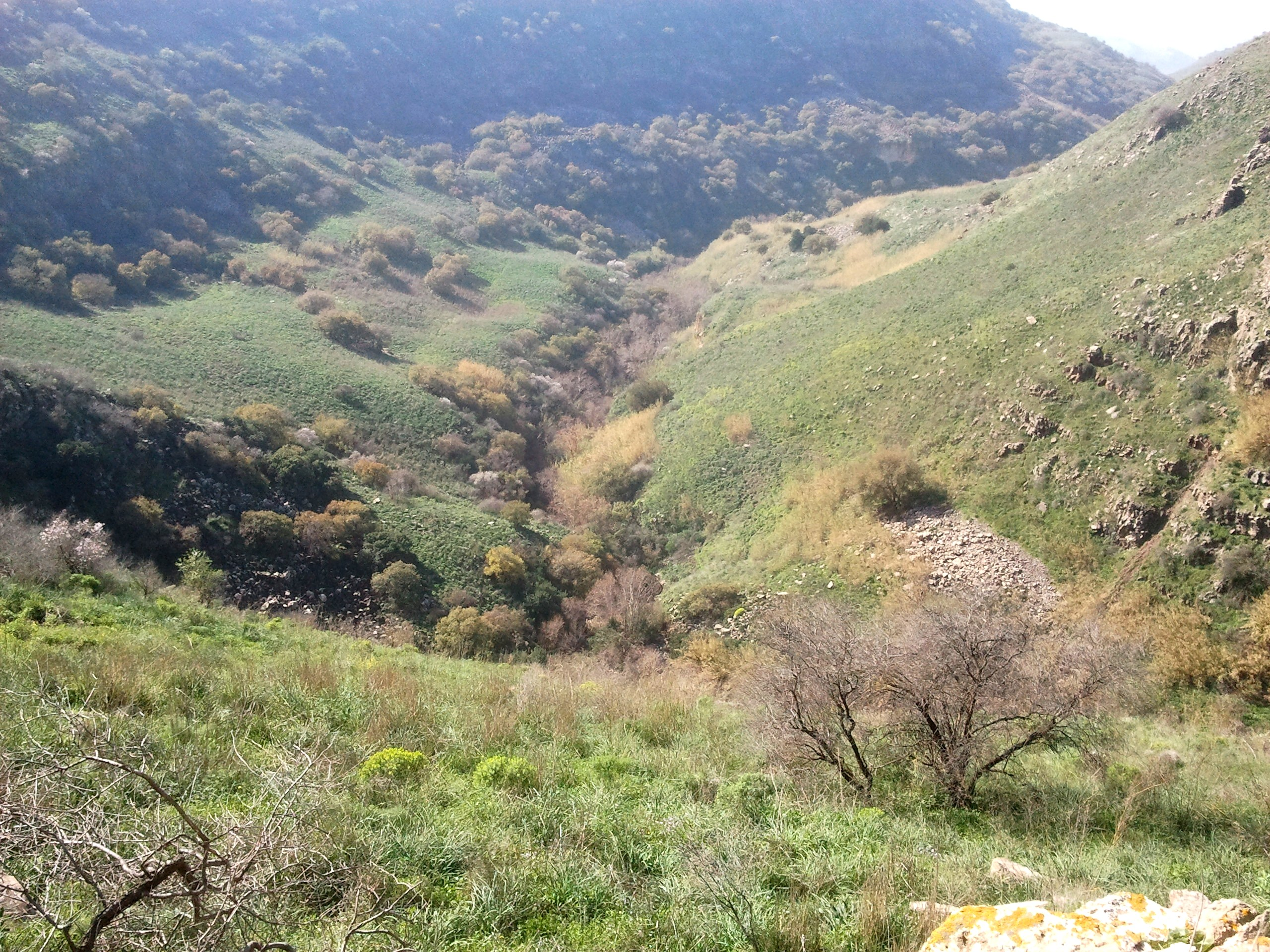 נחל דליות בתחומי שמורת גמלא במפגש עם נחל בזלת שנשפך אליו